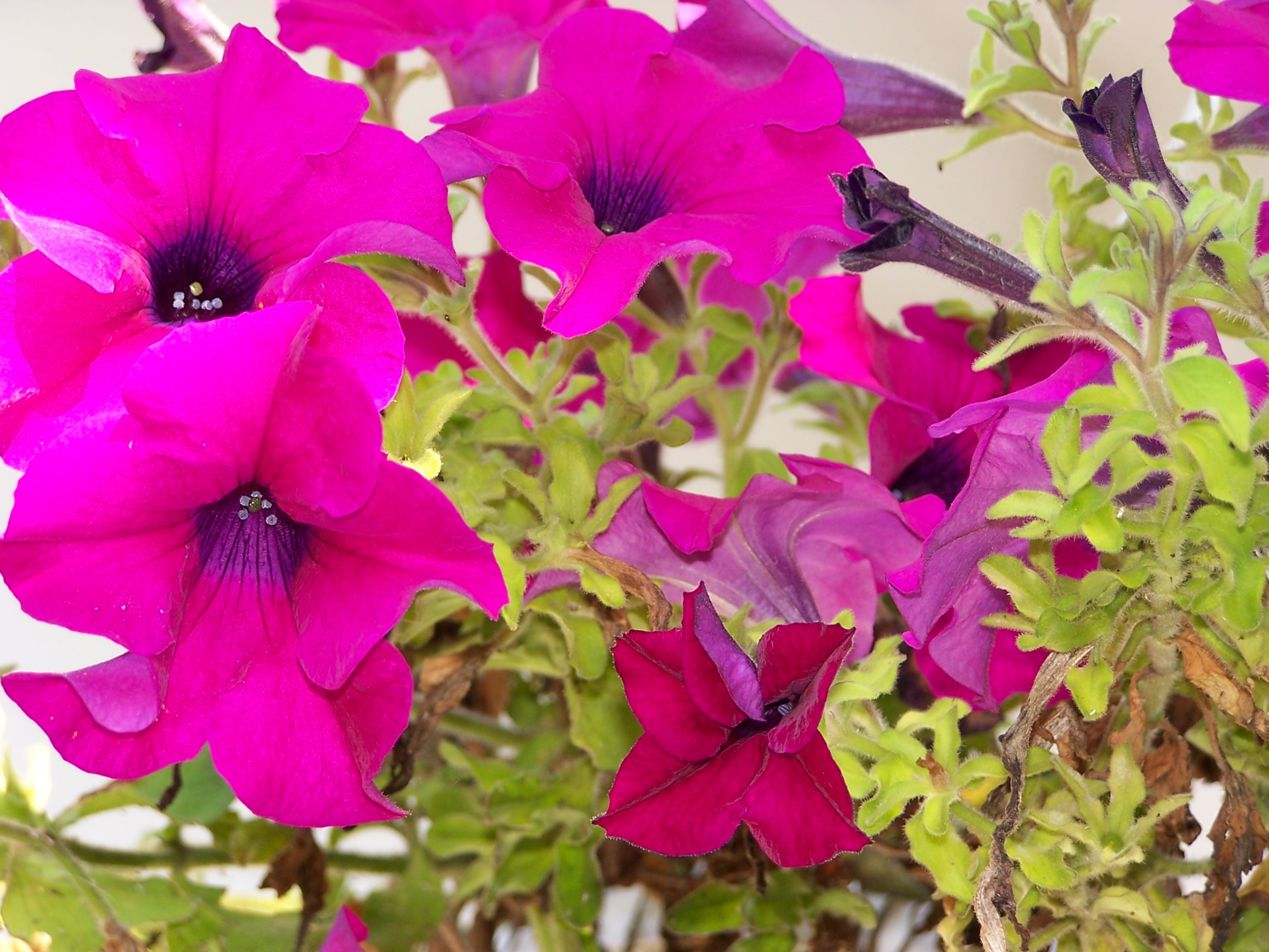 Petunia hybrida